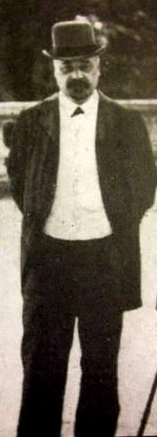 Деятель российского политического сыска Пётр Иванович Рачковский (1851-1910).